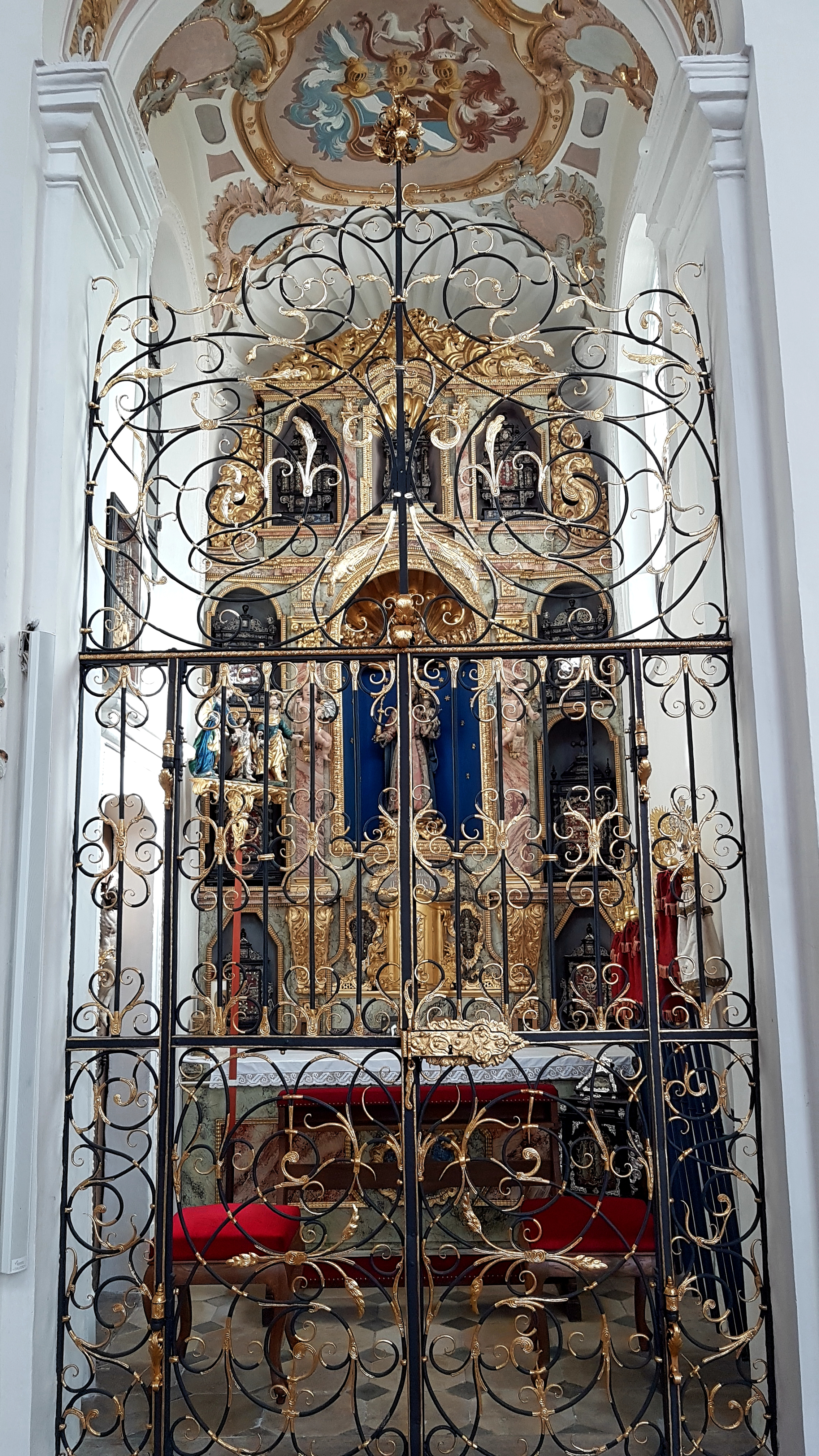 St. Ulrich (Eresing), Marien-Bruderschaftskapelle mit den Heiligtümern